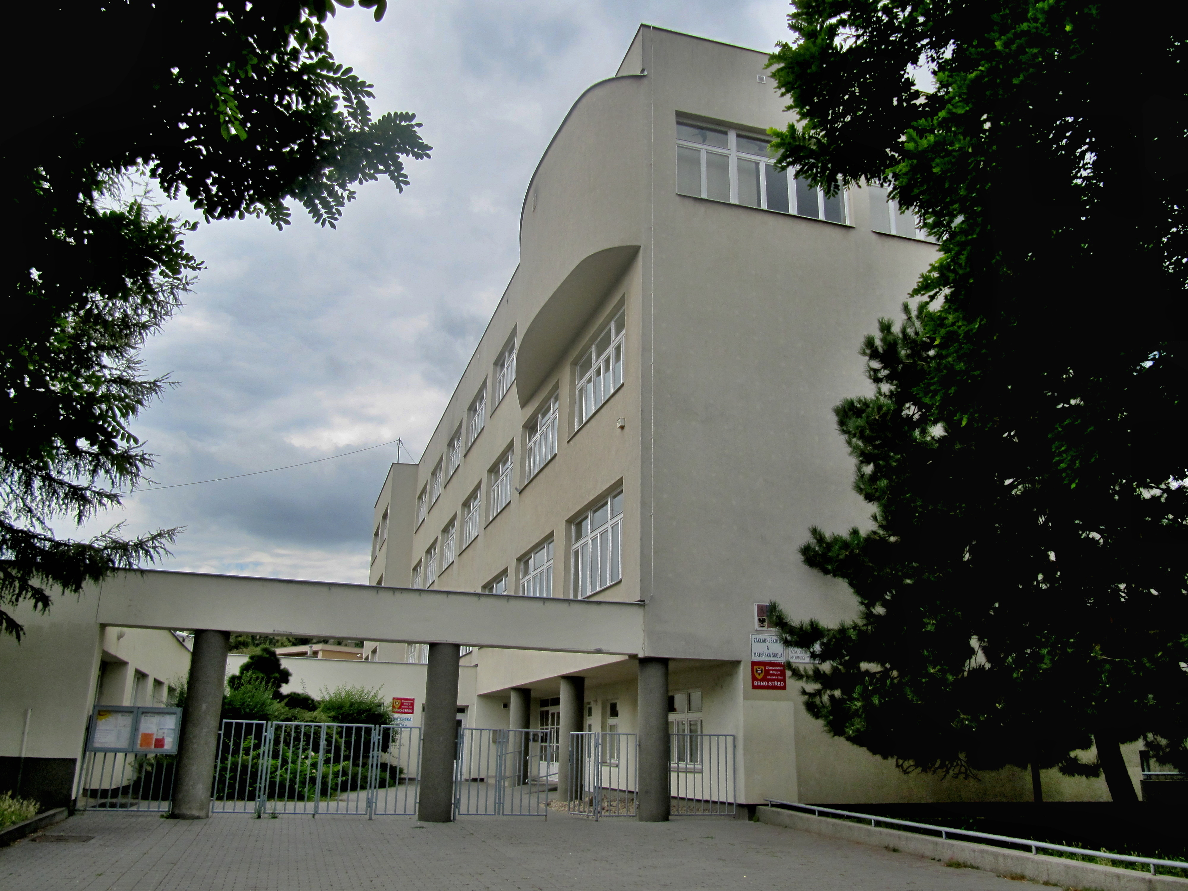 Brno, Křídlovická ulice.